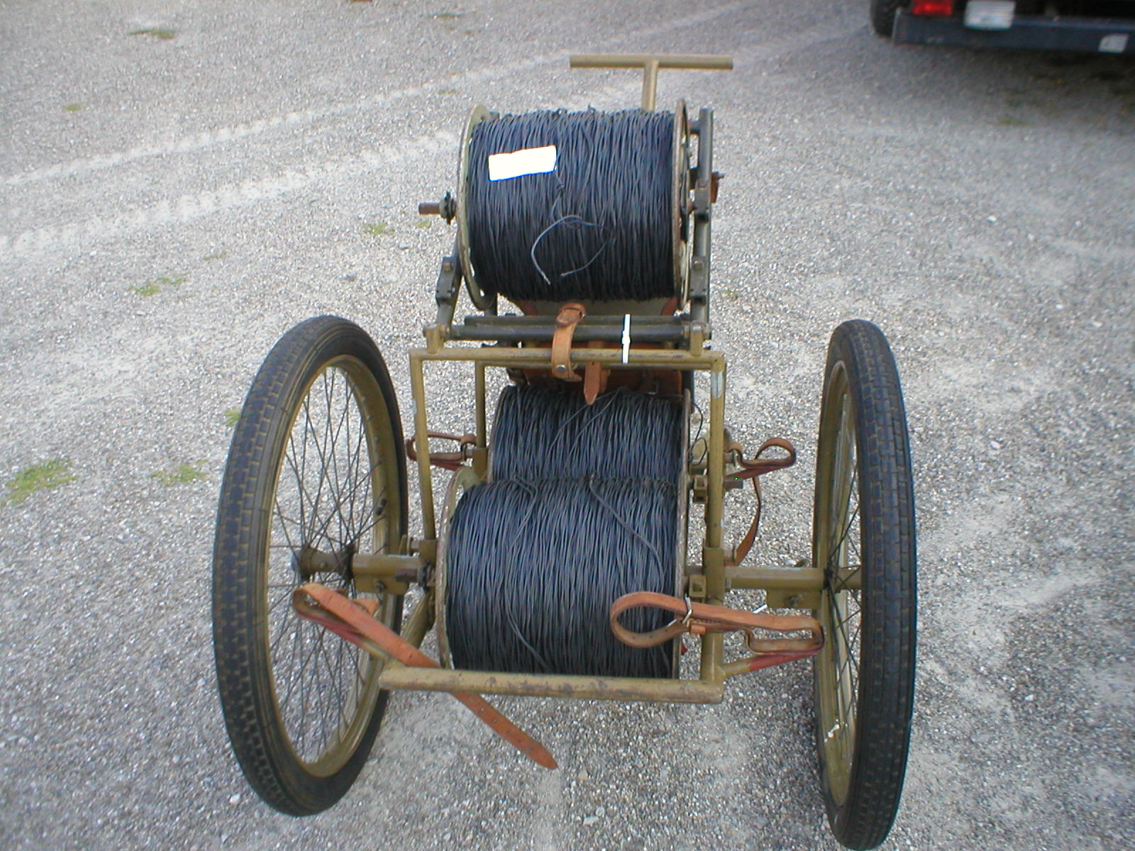 Baukarren bestückt mit 3 Feldkabeltrommeln